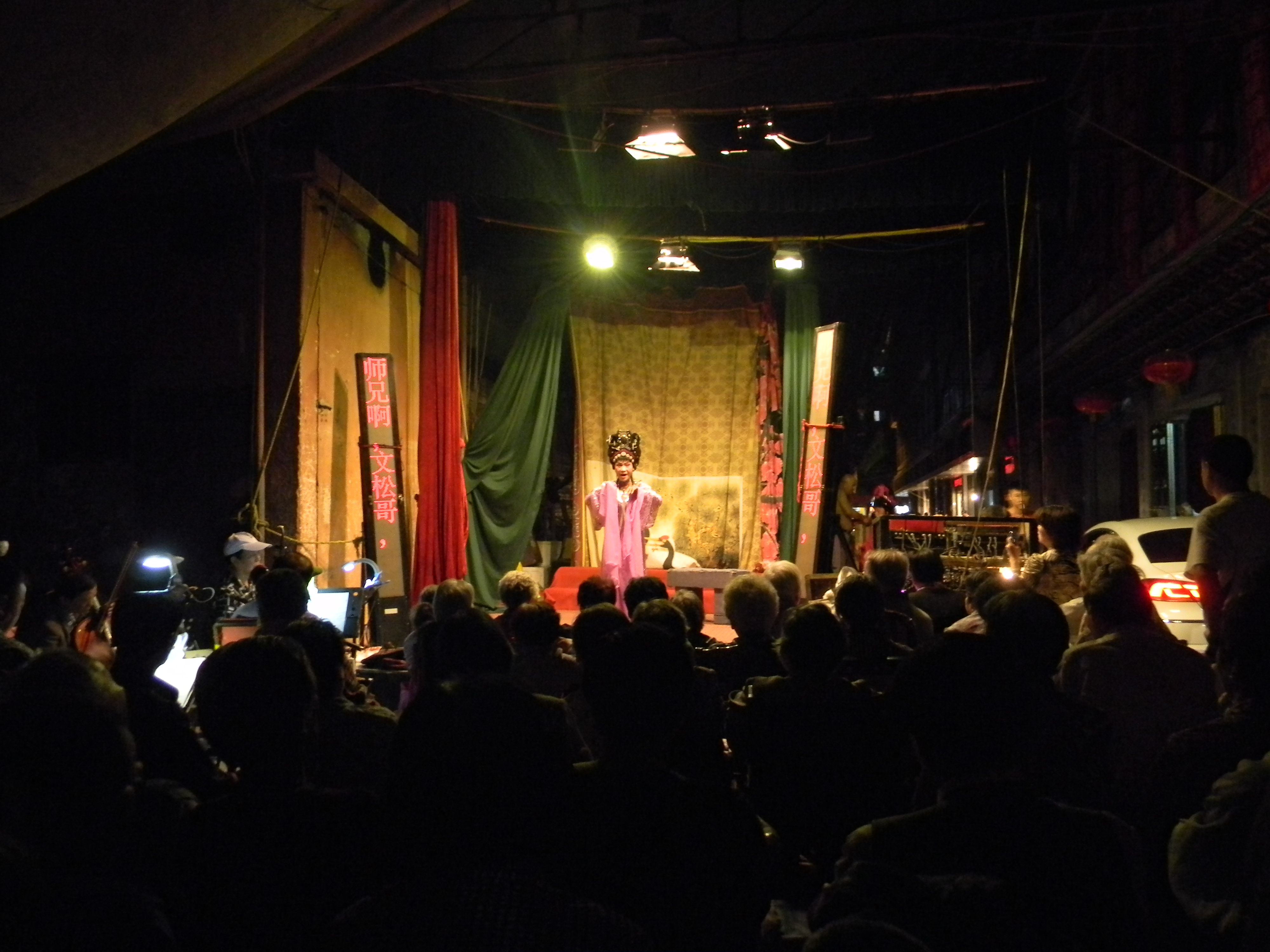 公元2015年4月30日（农历三月十二）福州裴仙宫前闽剧。